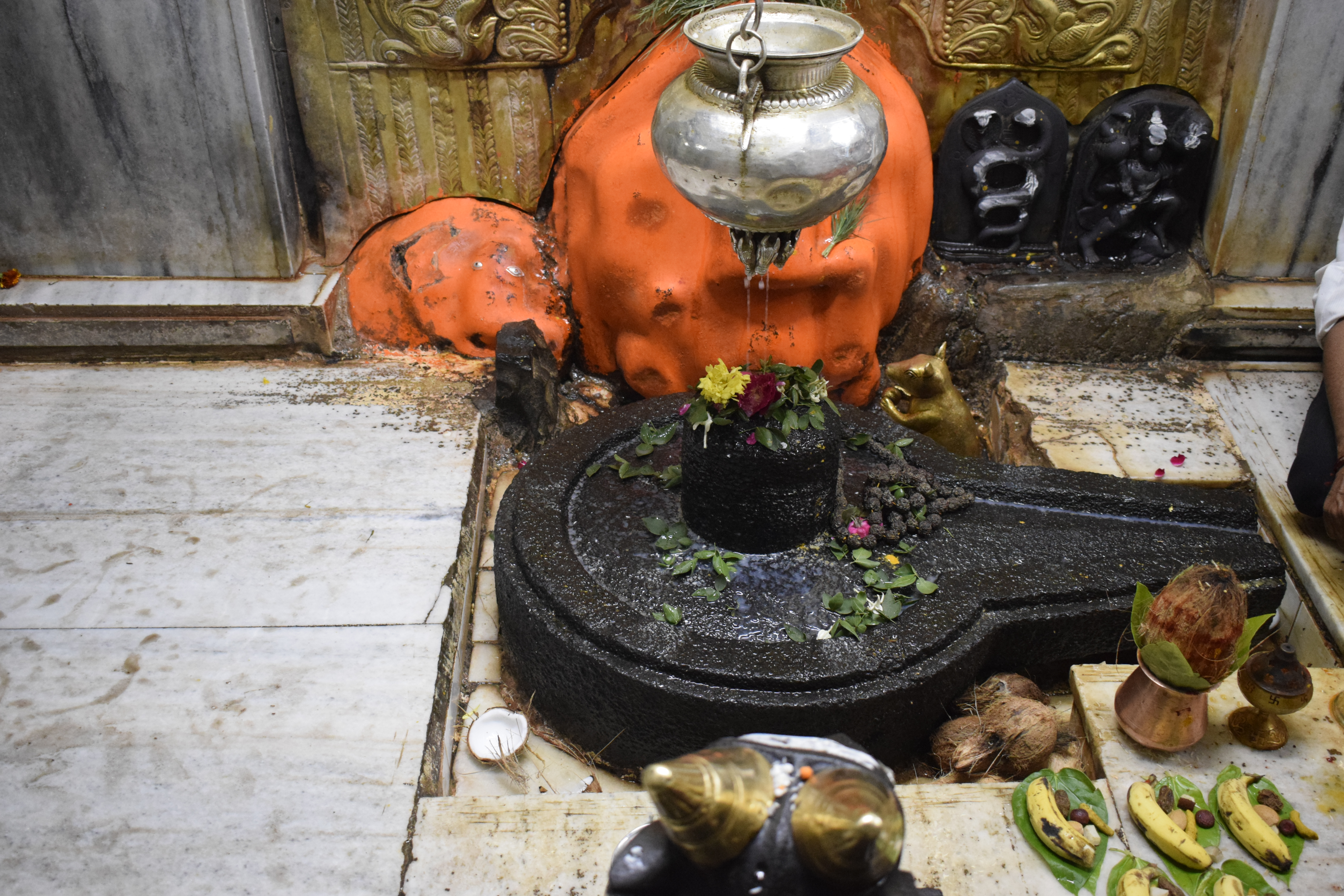 श्री कामेश्वर लिंग